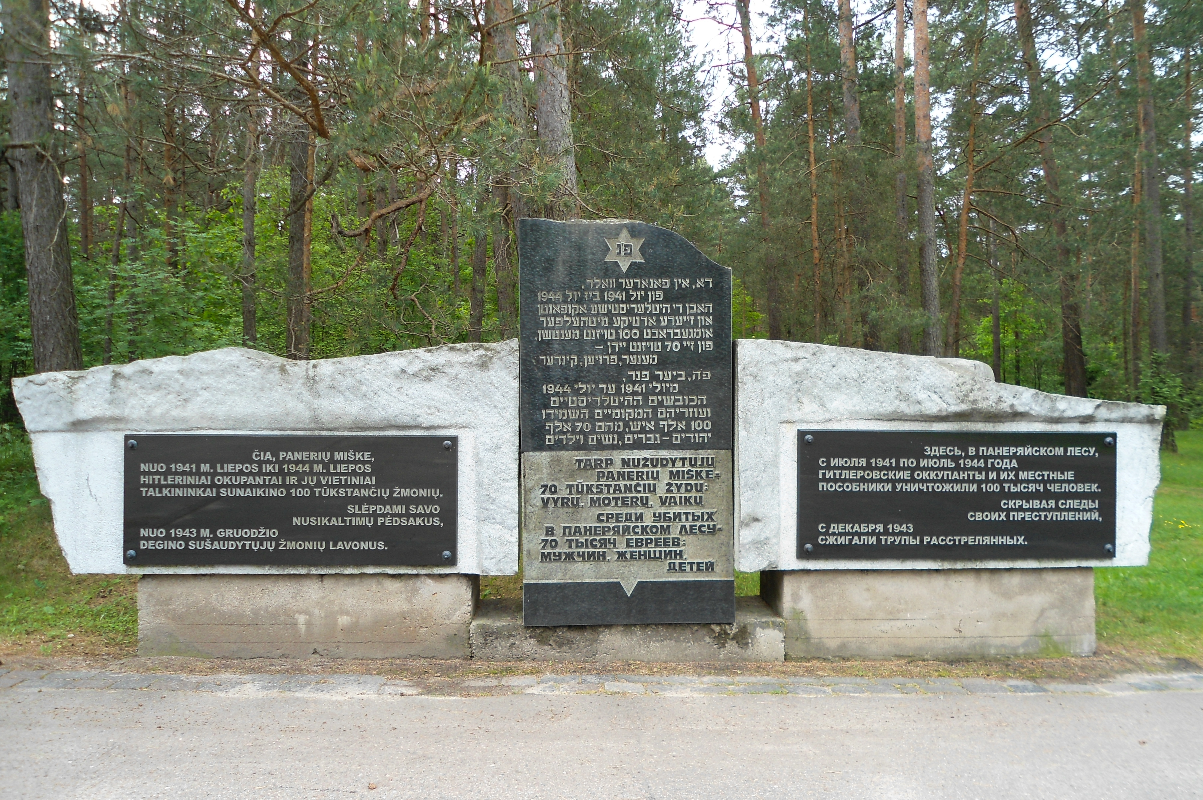 Paneriai memorial